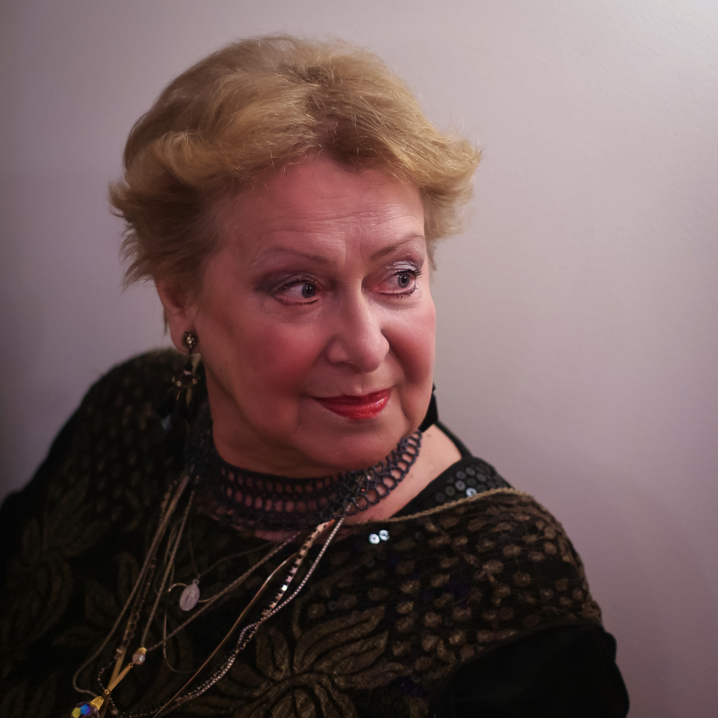 Latviešu teātra un kino aktrise Helga Dancberga